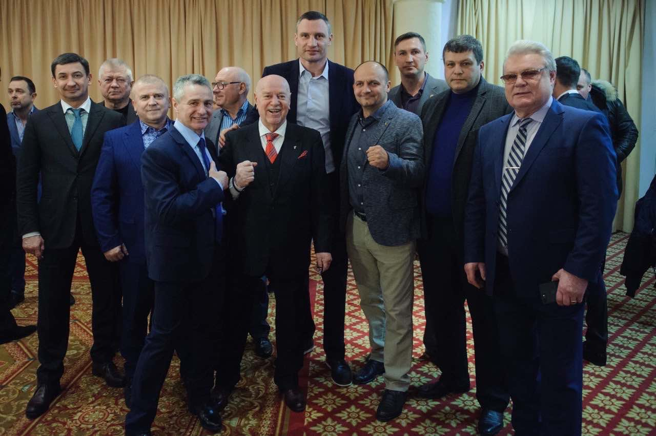 В Киеве отметили 25-летие национальной лиги профессионального бокса в Украине.